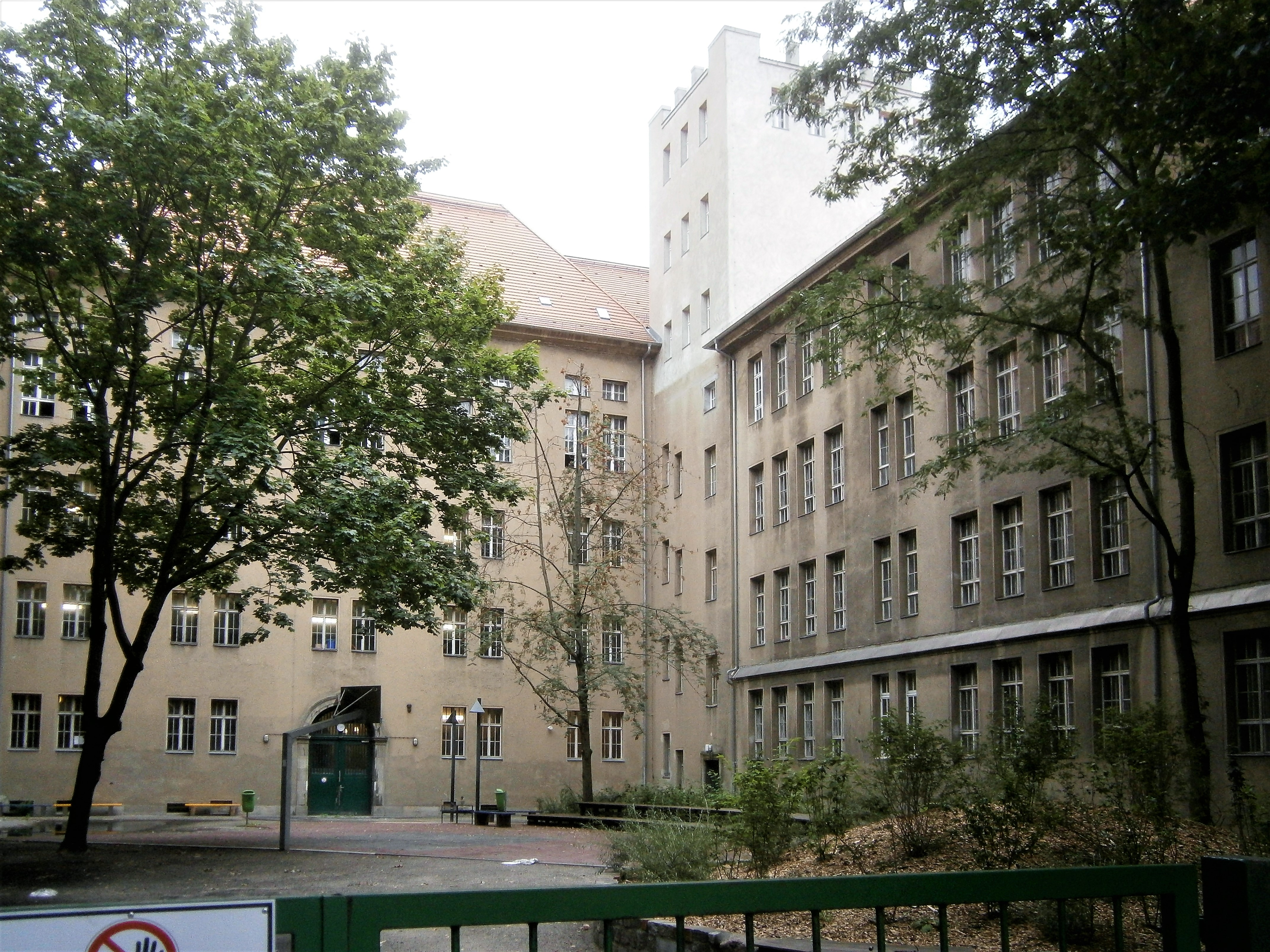 Die Andreasstraße ist eine Straße im Berliner Bezirk Friedrichshain-Kreuzberg, Ortsteil Friedrichshain. Angelegt wurde sie 1862 auf vorherigen Gartenland und 1863 benannt. Bis um 1900 waren die Grundstücke bebaut und bis 1930 wurde verdichtet. Bei Luftangriffen im Zweiten Weltkrieg wurde die Gebäude schwer getroffen. So ist die Straße seit den 1950er Jahren mit wiederhergestellten Altbauten, aber besonders durch Plattenbau-Wohnblöcke aber seit 1990 auch durch Hotel- und Bürobauten im Umfeld des Ostbahnhofs charakterisiert. Das Bild zeigt: Innenhof der Andreasschule nach Südost. Der Eingang liegt zur Koppenstraße.